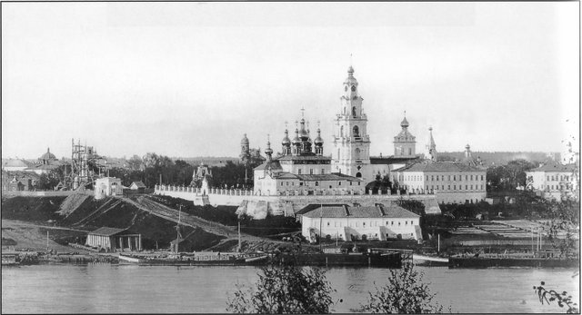 Kremlin in Kostroma